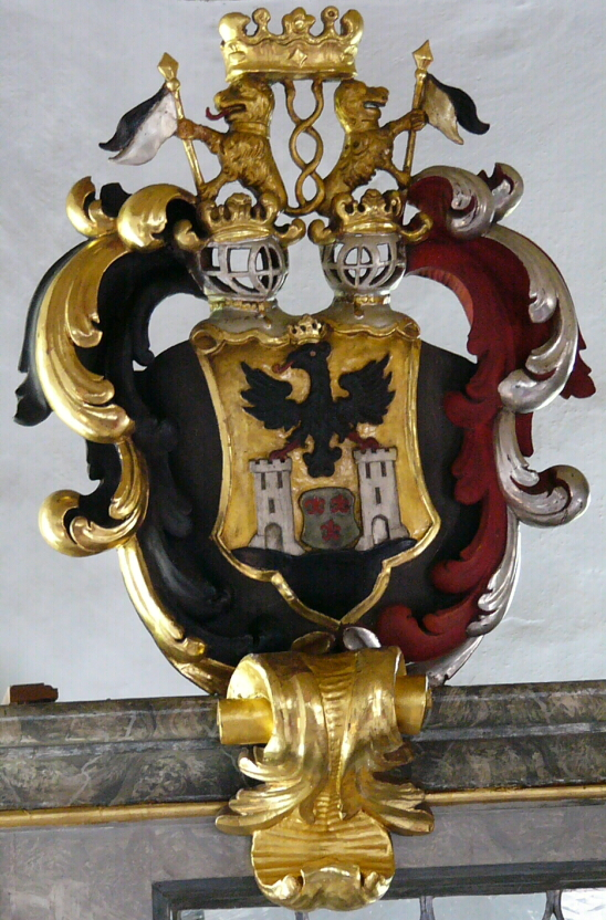 Pühel-Wappen am Döhlauer Altar